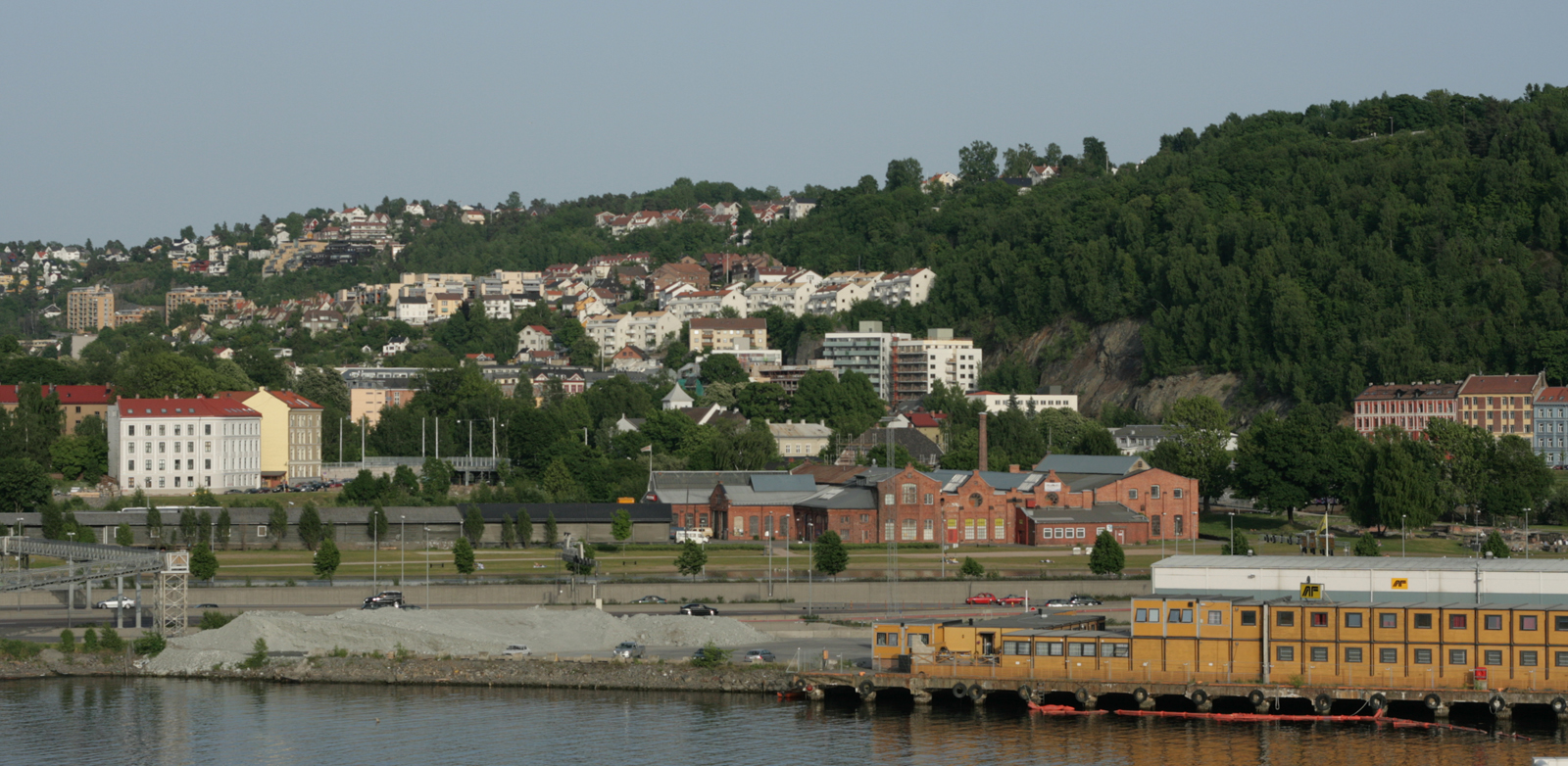 Sørenga, Oslo.